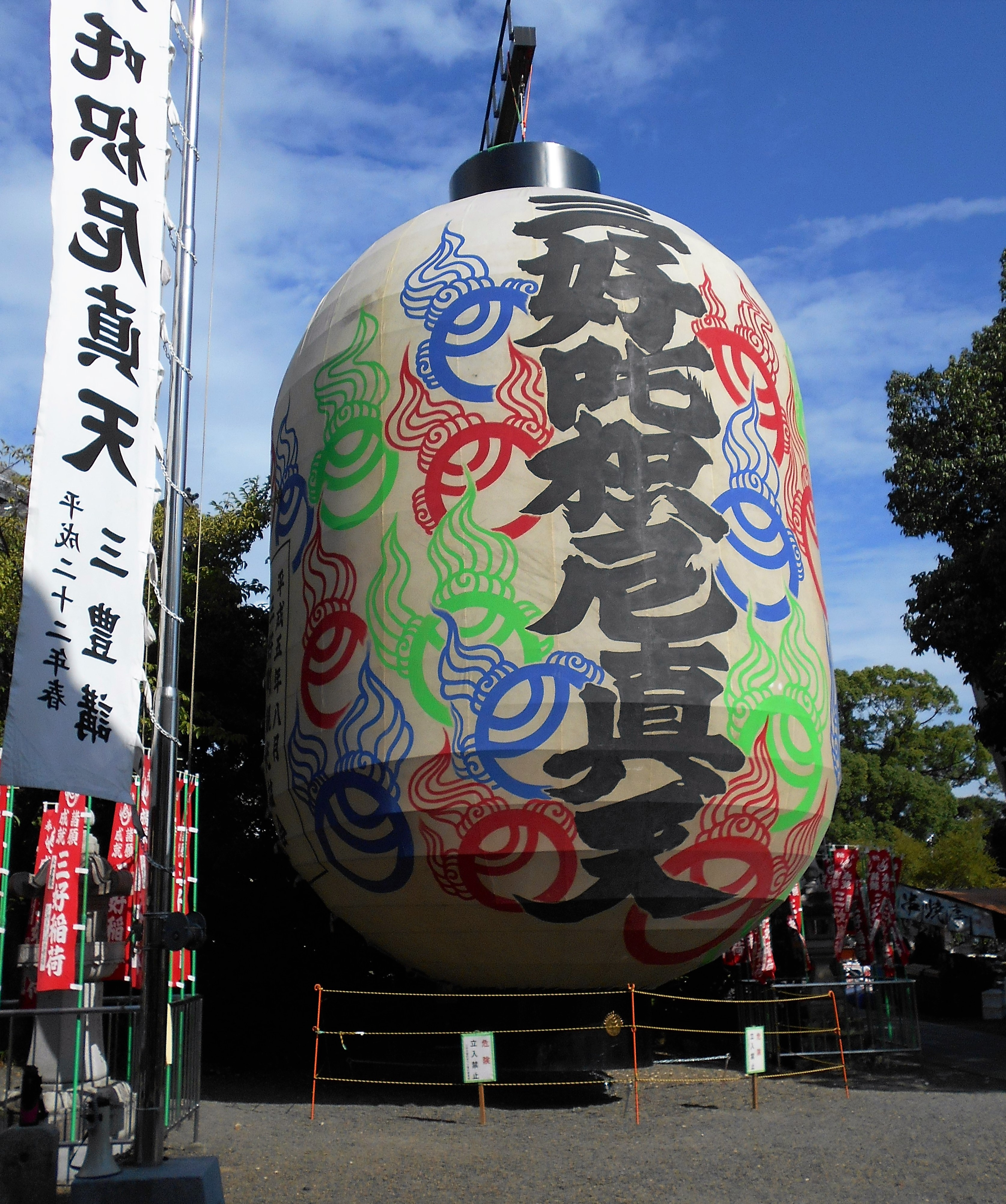 三好稲荷閣夏季大祭（三好大提灯まつり）で奉納される大提灯（愛知県みよし市、2016年8月）